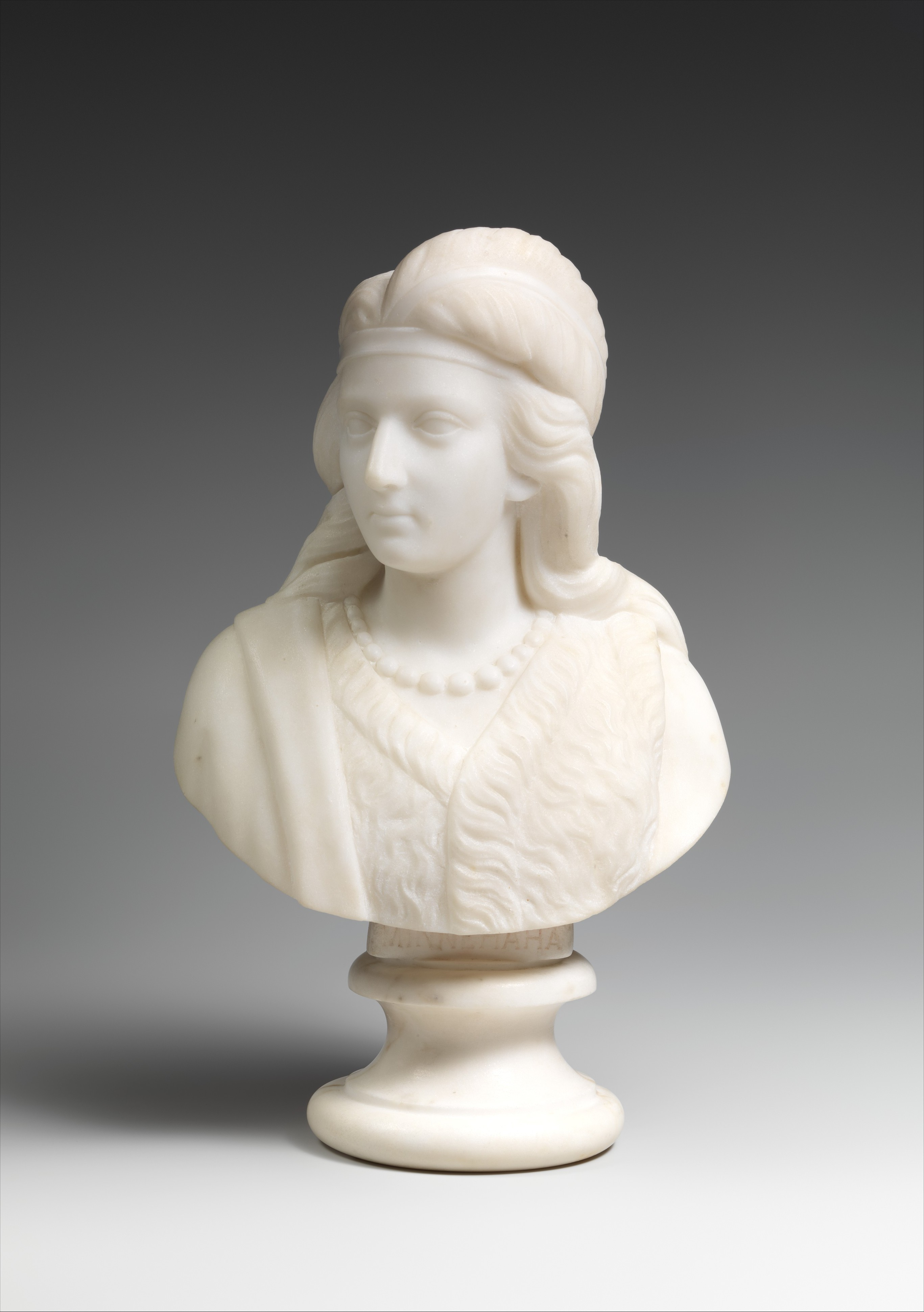 Bust; Sculpture